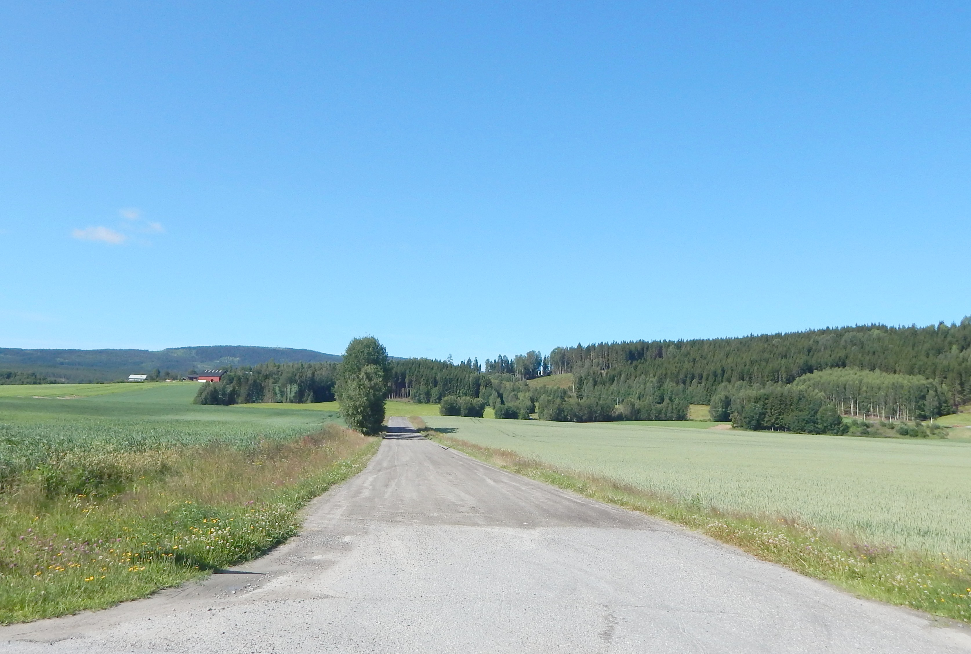 Gjerdrumsvegen (FV506) ved Vestsidevegen (FV505)